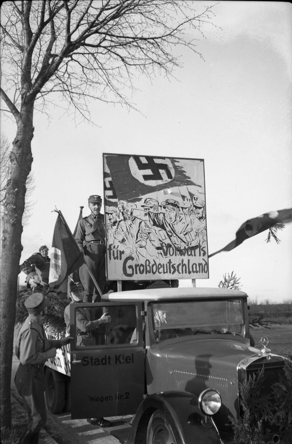 Wagen Nr. 2 der Stadt Kiel mit dem Plakat "Vorwärts für Großdeutschland".